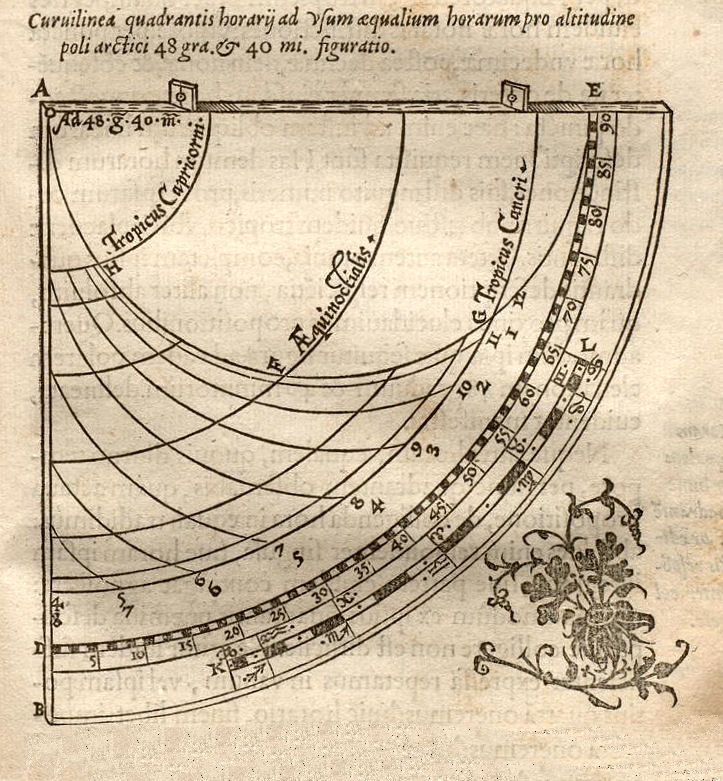 Quadrant ancien à heures égales pour lat. 48° 40', O. Finé